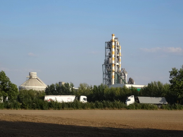 Cementownia Kujawy w Piechcinie k. Barcina, woj. kujawsko-pomorskie - widok z drogi wojewódzkiej nr 251